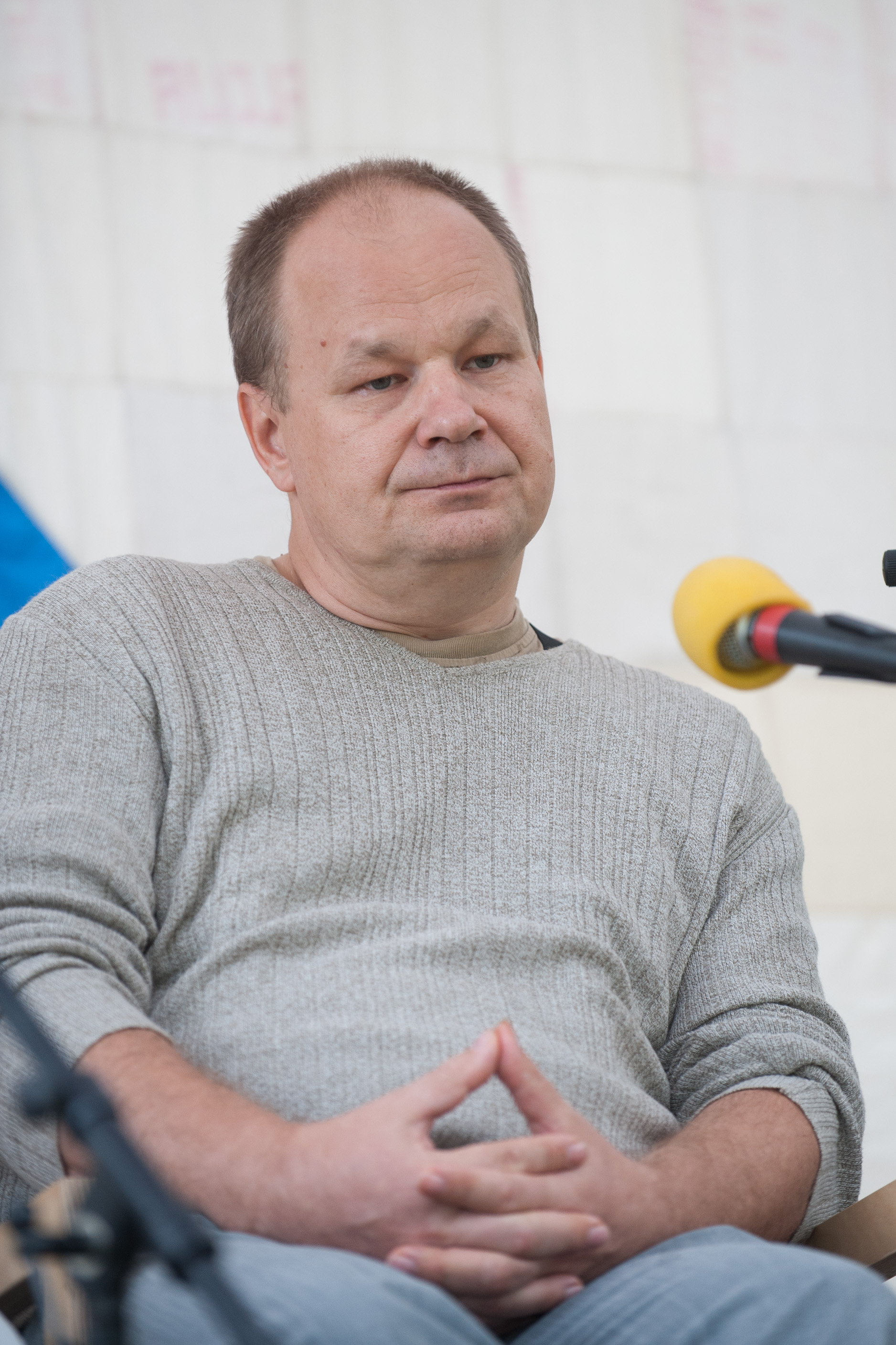 Arvamusfestival 2014: "Eesti julgeolek: kuidas ja mille eest"